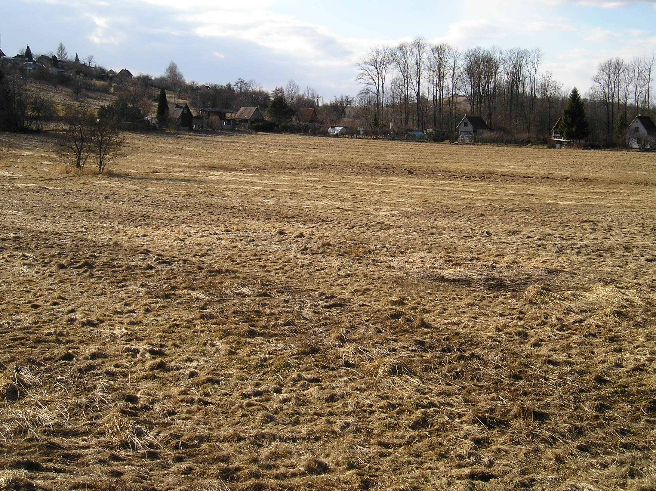 Přírodní památka "U Vinic"